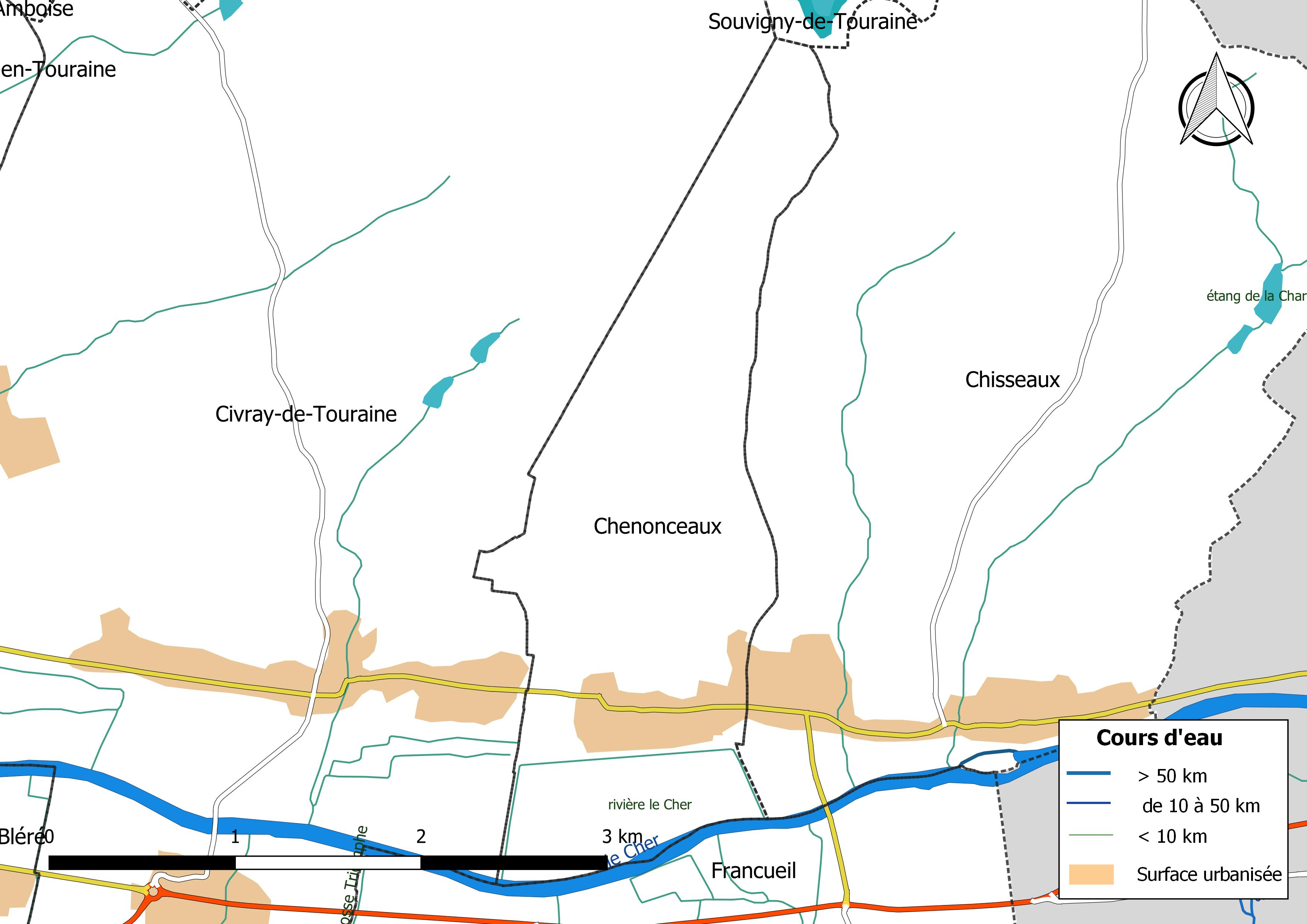 Carte du réseau hydrographique de la commune de Chenonceaux (France).